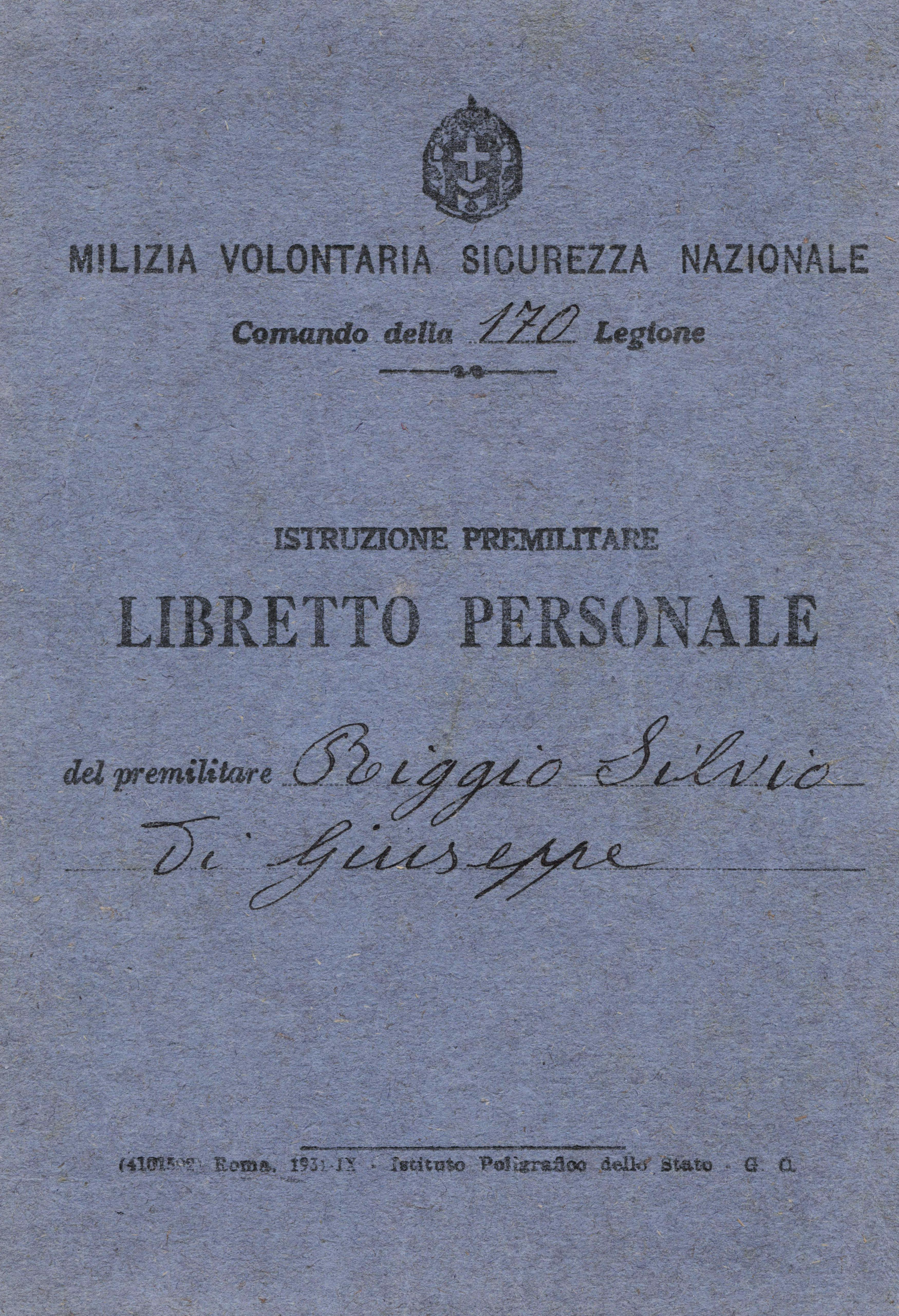 Libretto personale per l'istruzione premilitare, gestita dalla M.V.S.N. (Milizia volontaria sicurezza nazionale), Comando 170a legione. Verso la metà degli anni Trenta del XX secolo. Titolare: Silvio Riggio fu Giuseppe